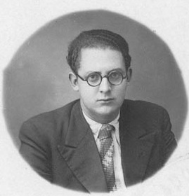 Xosé María Álvarez Blázquez